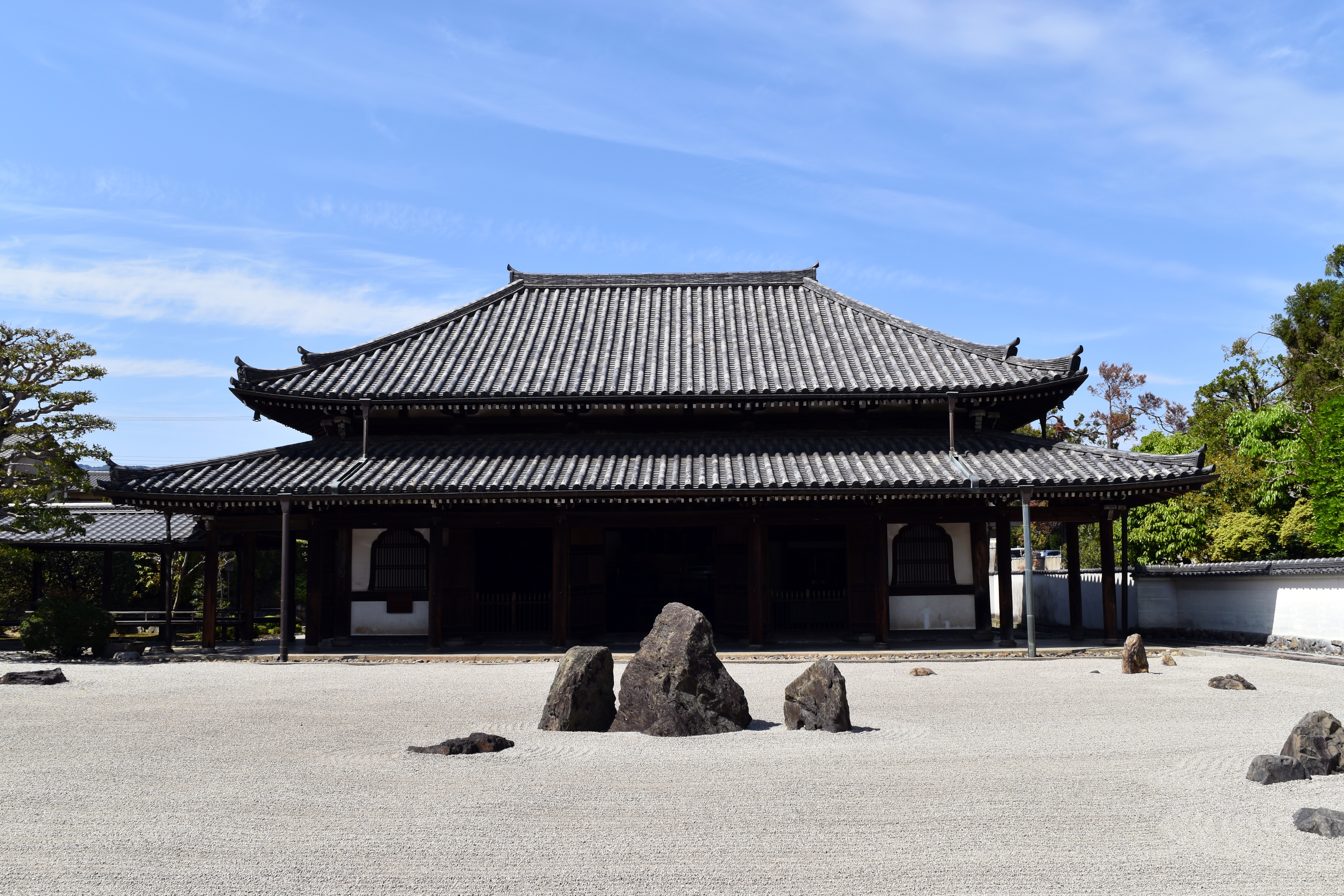 臨川寺三会院